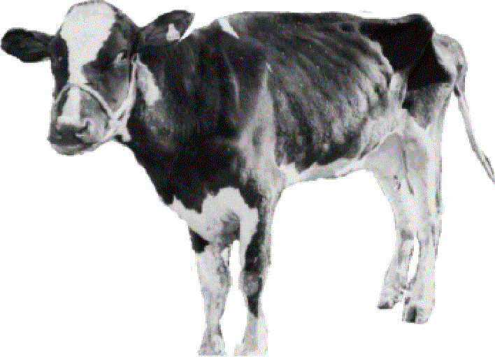 国内で発生したホルスタイン牛のヨーネ病発症例。繰り返し検査によりこのように重度の感染はめったに見られなくなった。